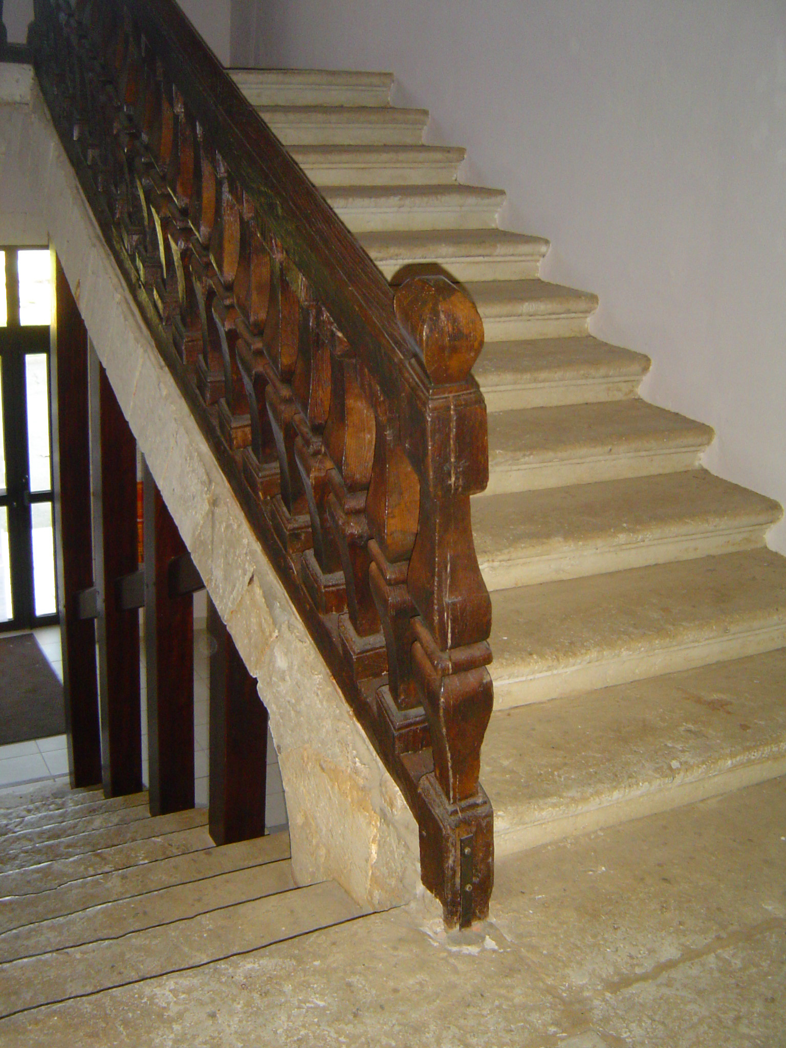 Escalier de la mairie de Banos, Landes, France